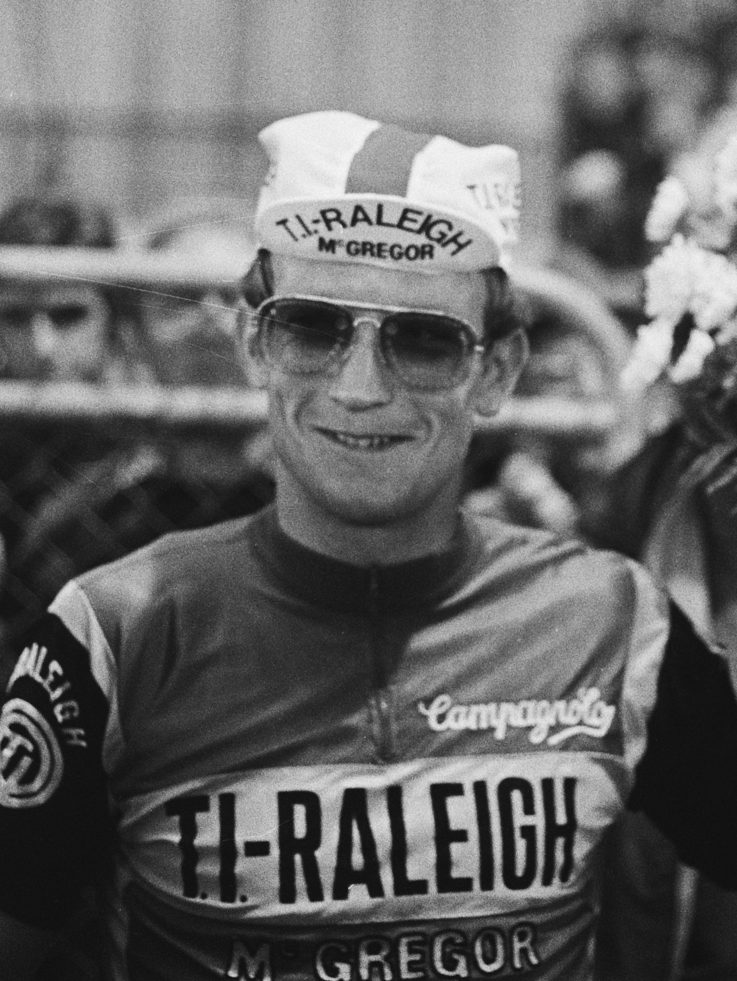 Tour de France 1978, proloog in Leiden; winnaar Jan Raas met bloemen maar zonder gele trui, burgemeester Vis (Leiden) in gesprek met Tourdirecteur Levitan (r).